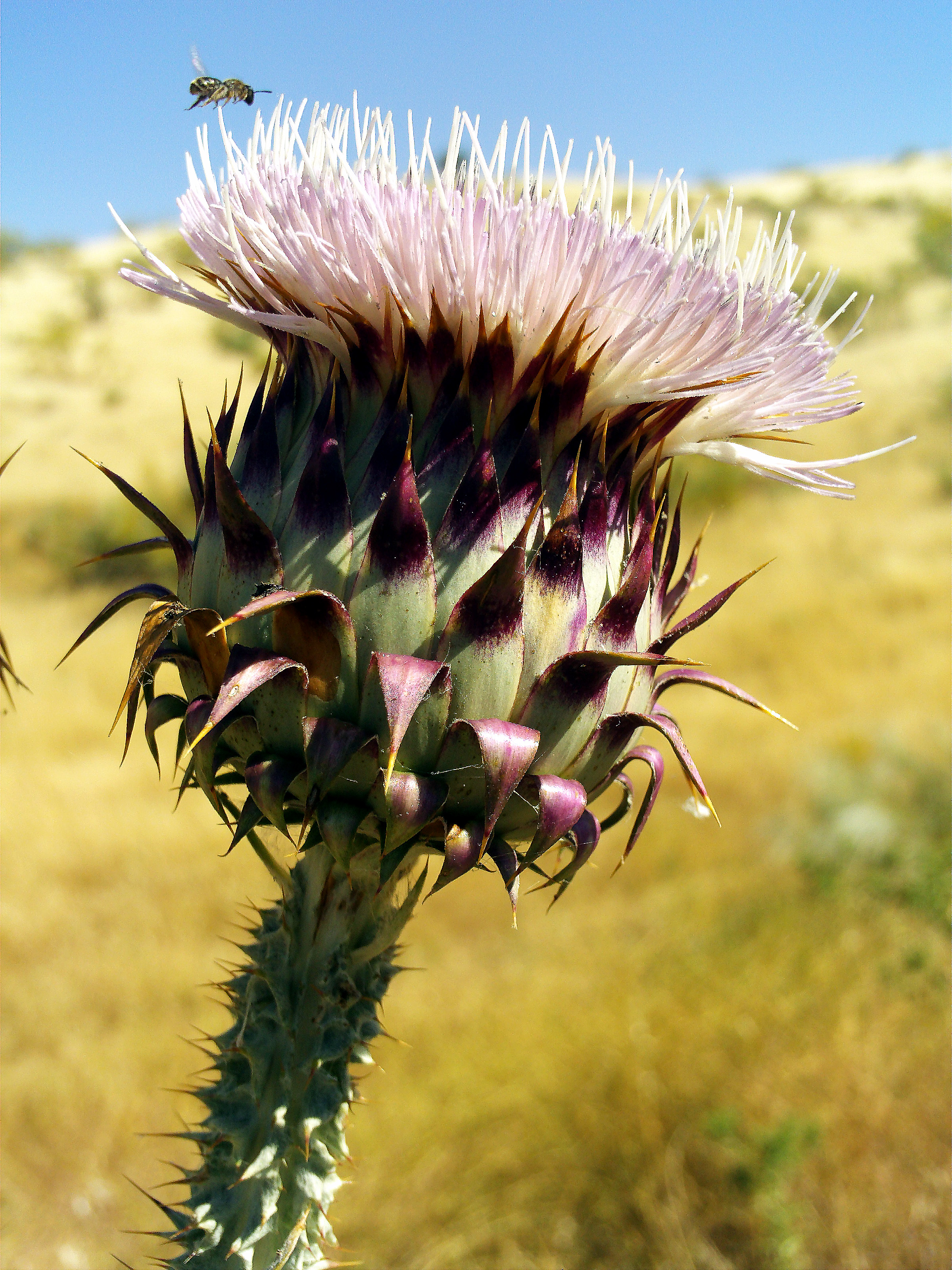 Onopordum illyricum - closeup; Mestanza, Spain